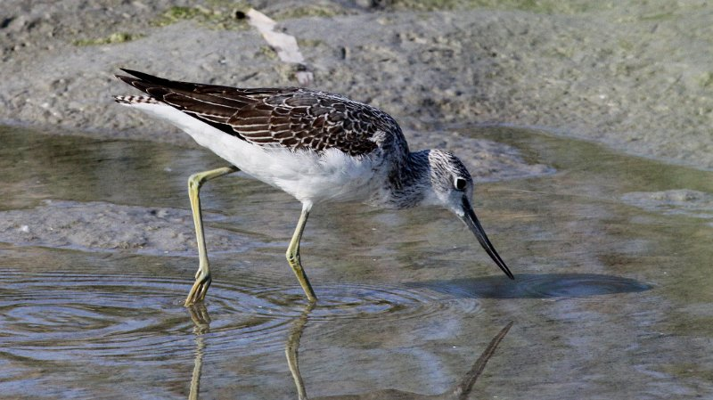 Greenshank (Tringa nebularia), Rheindamm, Vorarlberg, Austria